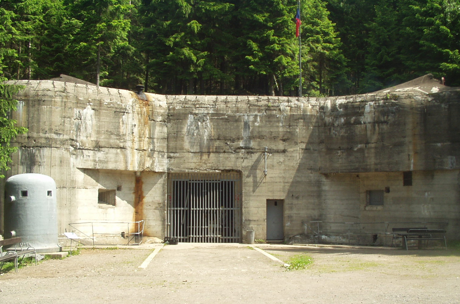 digitální fotografie vstupního objektu K-S 22a "Krok"